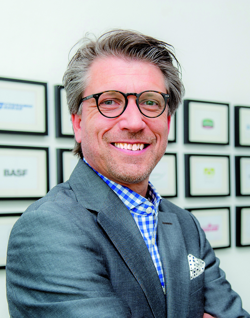 Portrait von Felix Maria Arnet, Coach und Autor aus Wiesbaden